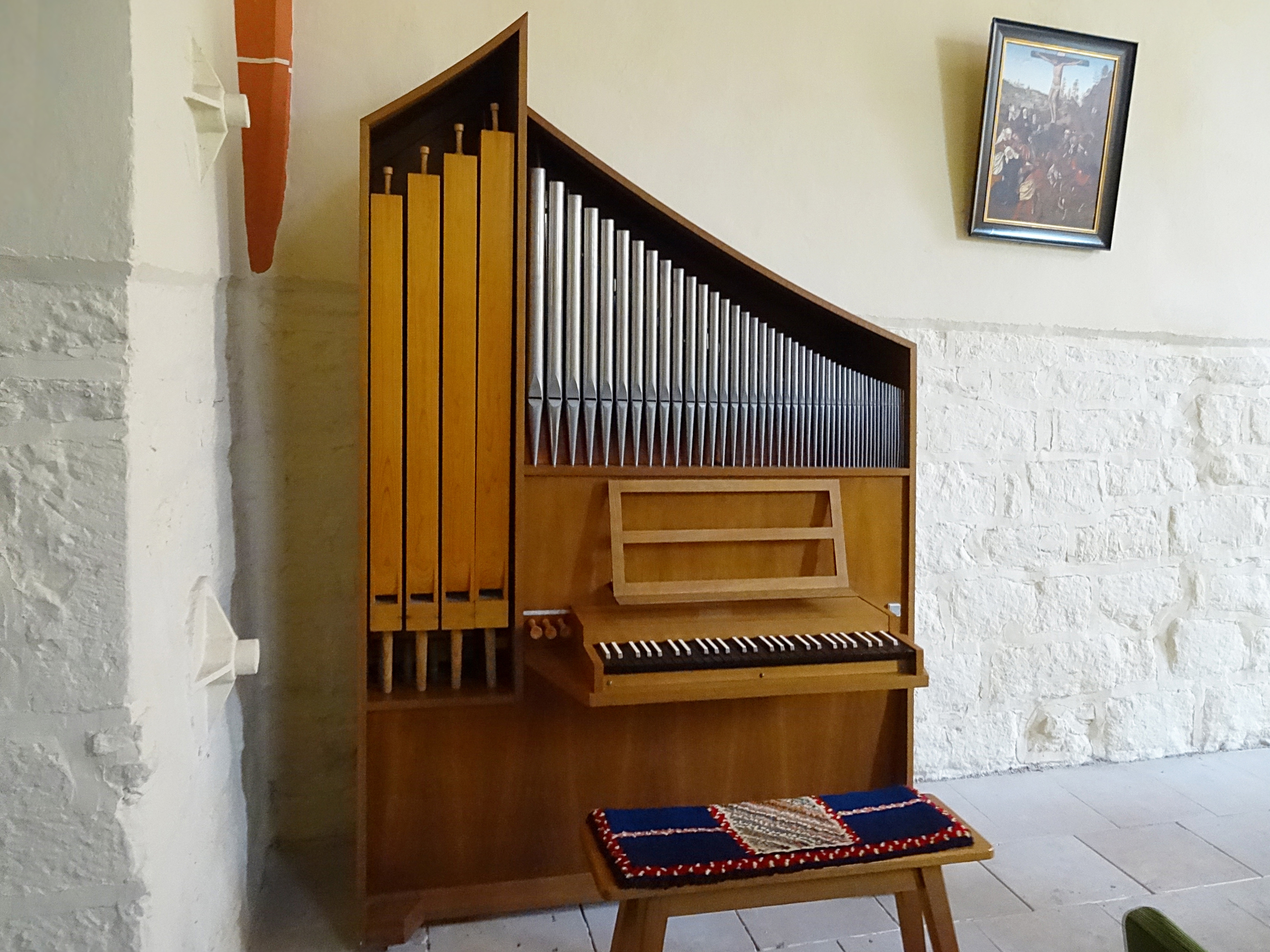 Truhen-Orgel in der Stadtkirche St. Marien (Artern)